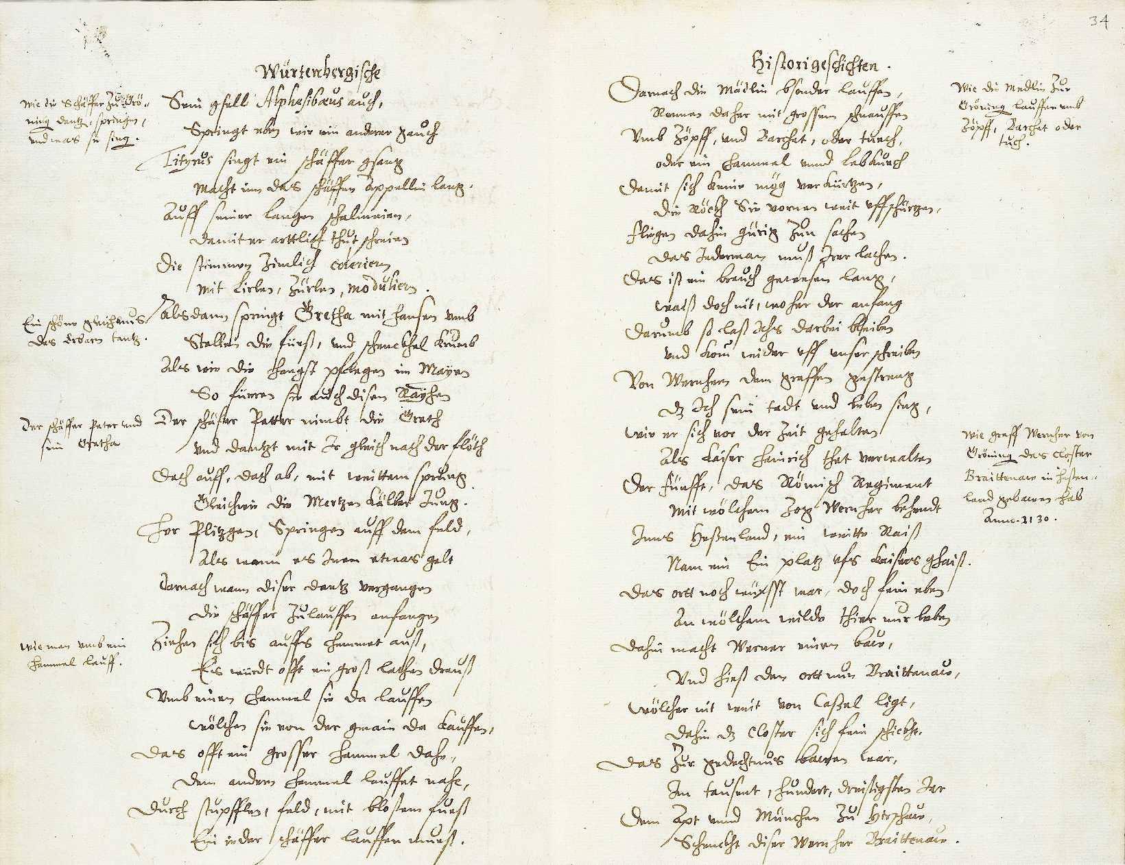 Lyrische Schilderung des Schäferlaufs (Auszug) von Jakob Frischlin: Geschichte der Grafen von Württemberg, [Reutlingen] 1599, S. 33v und 34r im Kapitel über Graf Werner IV. von Grüningen